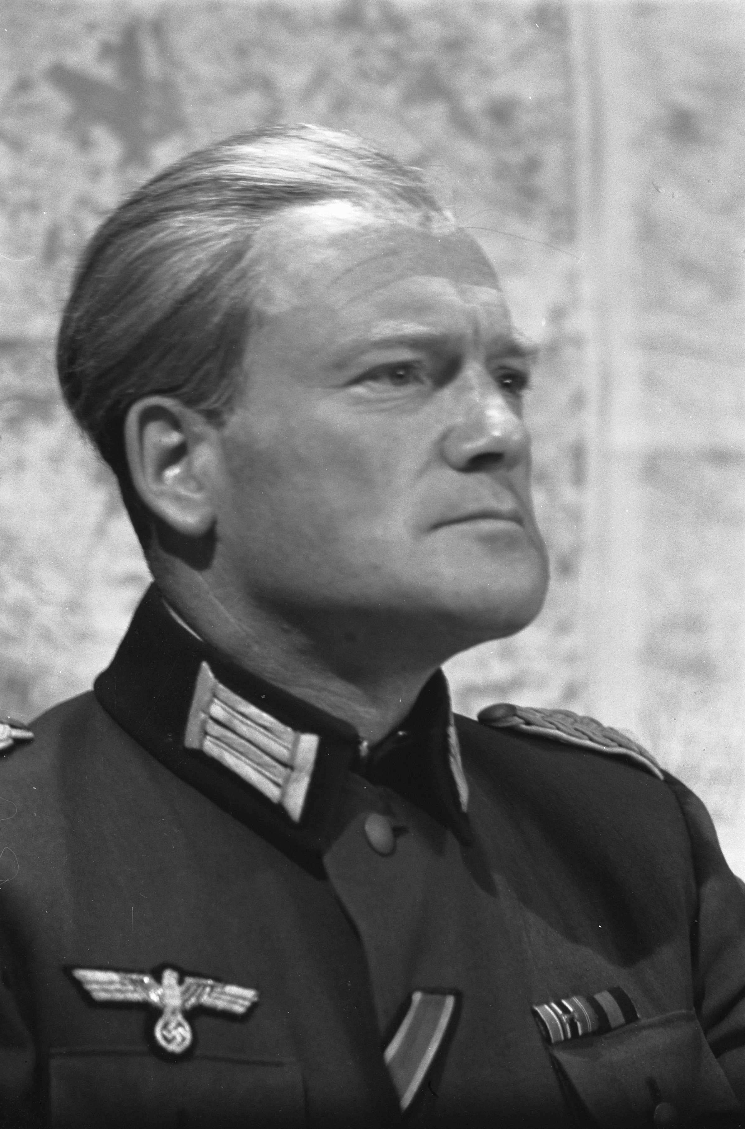 Collectie / Archief : Fotocollectie Anefo Reportage / Serie : [ onbekend ] Beschrijving : T.V. Spel "De Vliegenvanger" uitgezonden door de NTS. Max Croiset als Kolonel Lanser Annotatie : Bewerking van "The Moon is Down" van John Steinbeck Datum : 4 mei 1961 Trefwoorden : acteurs, televisiedrama's Persoonsnaam : Croiset, Max Fotograaf : Pot, Harry / Anefo Auteursrechthebbende : Nationaal Archief Materiaalsoort : Negatief (zwart/wit) Nummer archiefinventaris : bekijk toegang 2.24.01.05 Bestanddeelnummer : 912-4472 Reacties Geplaatst door Televisiefan op 28 maart 2017 - 20:54. Uitgezonden door de NTS